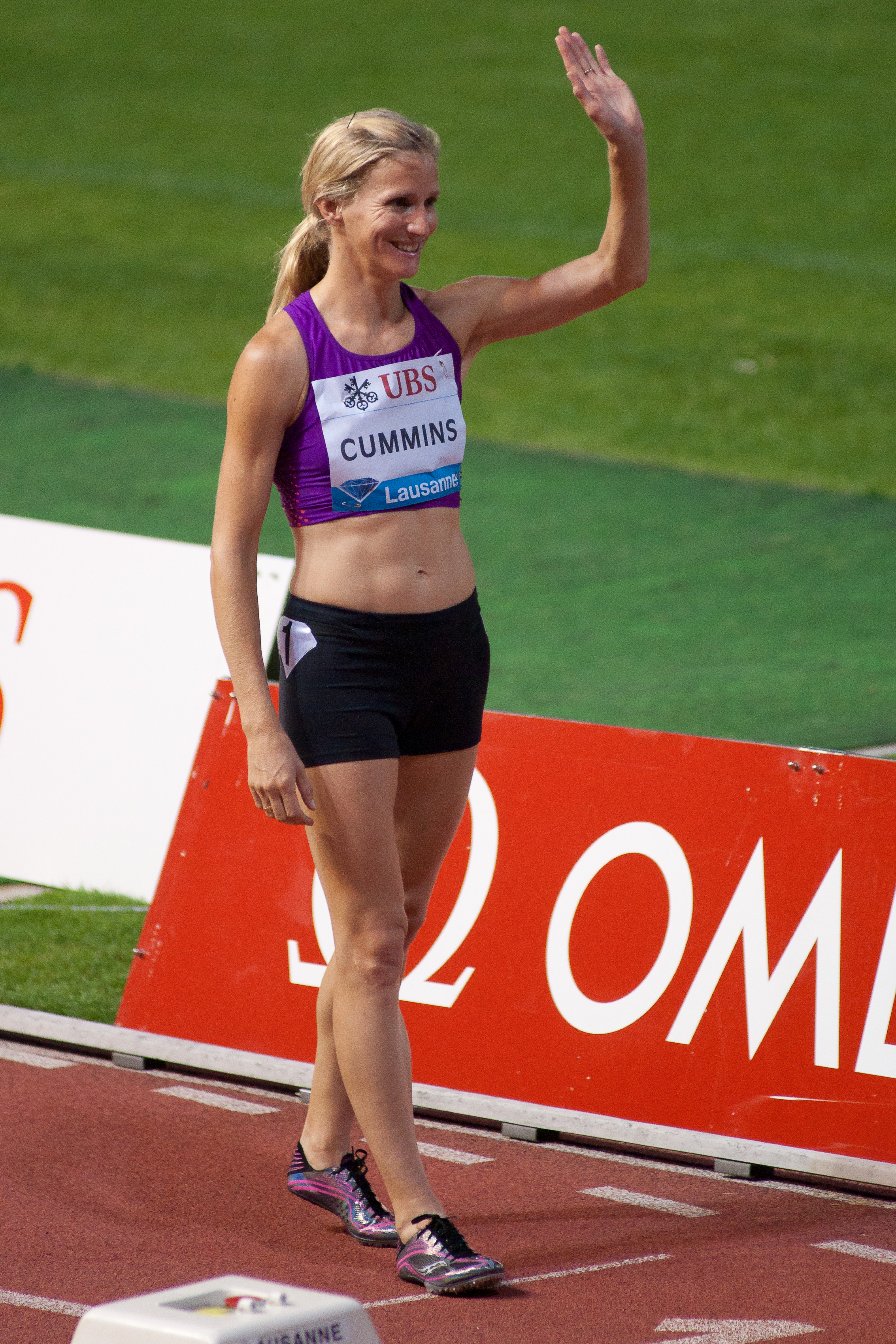 Athletissima 2012 - Diane Cummins